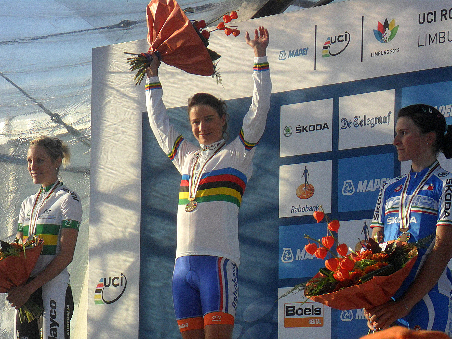 Podiumceremonie van het Wereldkampioenschap 2012 in Valkenburg, Nederland. 1. Marianne Vos, Nederland 2. Rachel Neylan, Australië 3. Elisa Longo Borghini, Italië